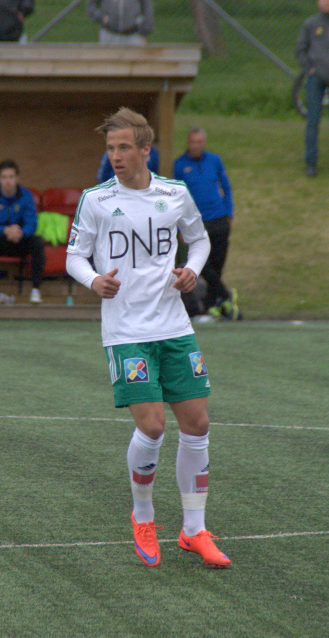 Henrik Lehne Olsen for Hamarkameratene